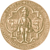 Władysław Opolczyk's duke seal